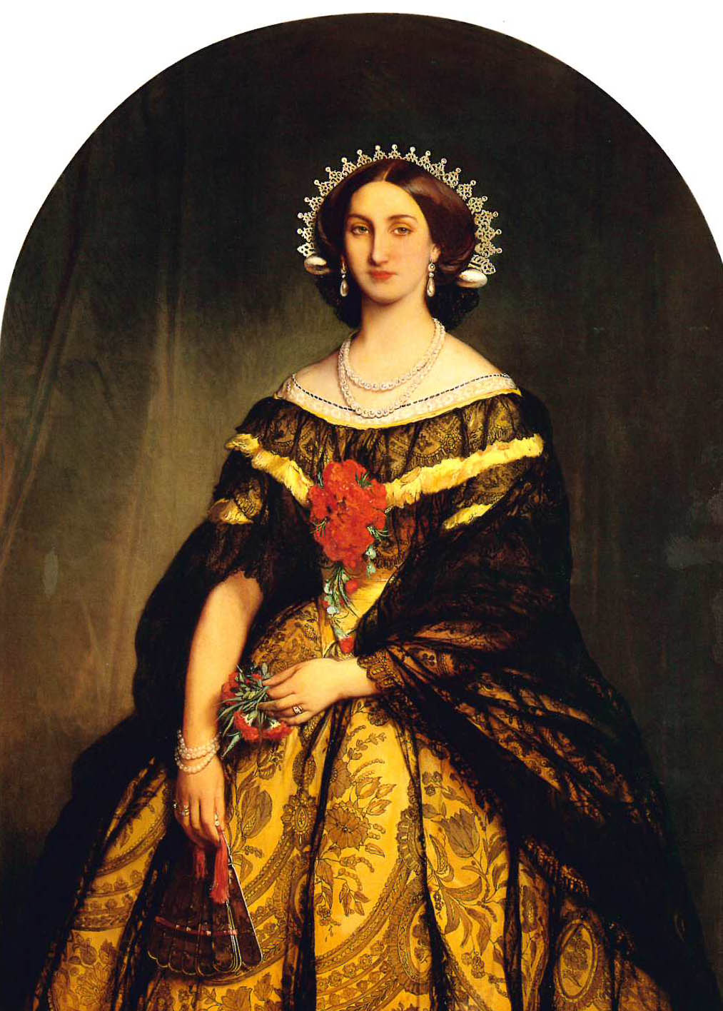 Ritratto dell'arciduchessa Carlotta in costume della Brianza